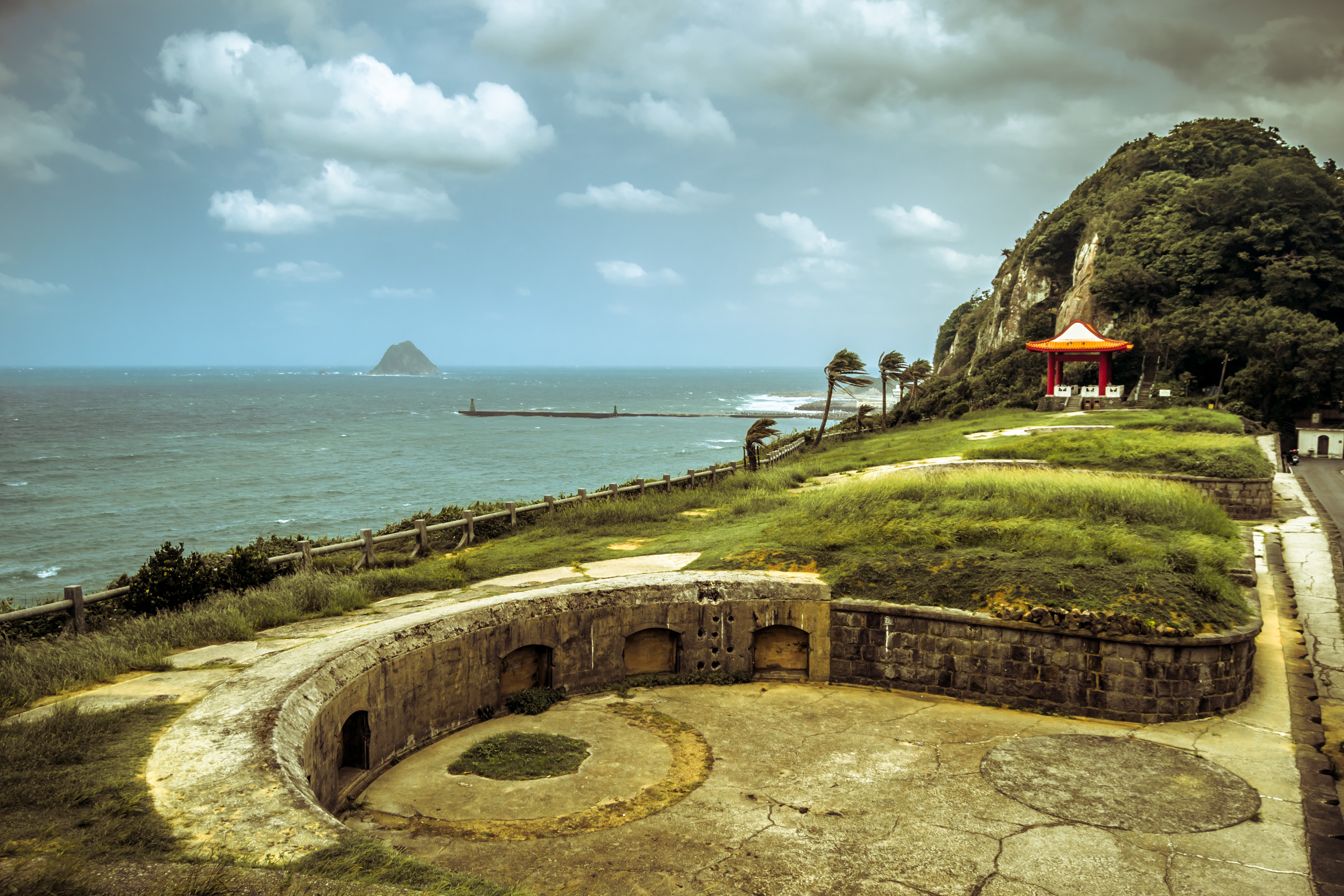 Baimiwong Fort